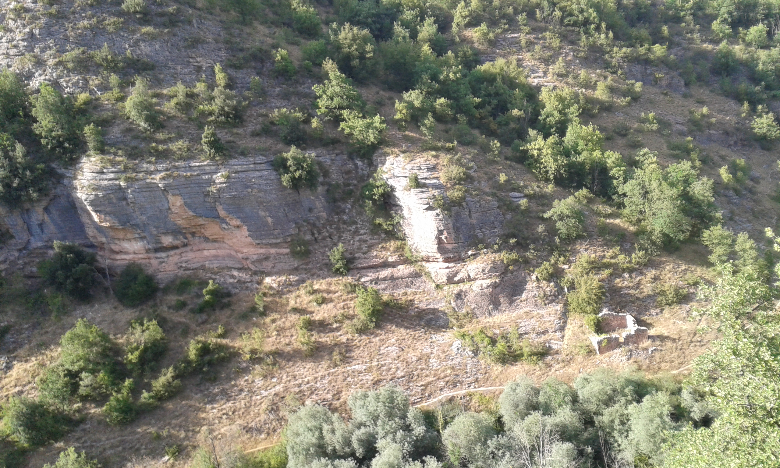 Resti di un casale presso la frazione Vetice di Montefortino lungo il fiume Tenna, poco più a valle delle gole dell'Infernaccio